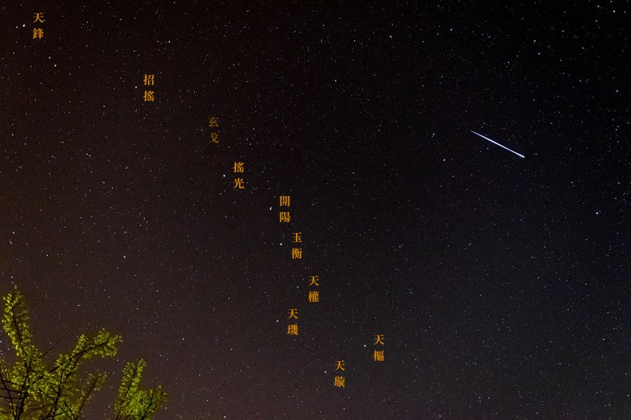 粵語: 北斗九星指南